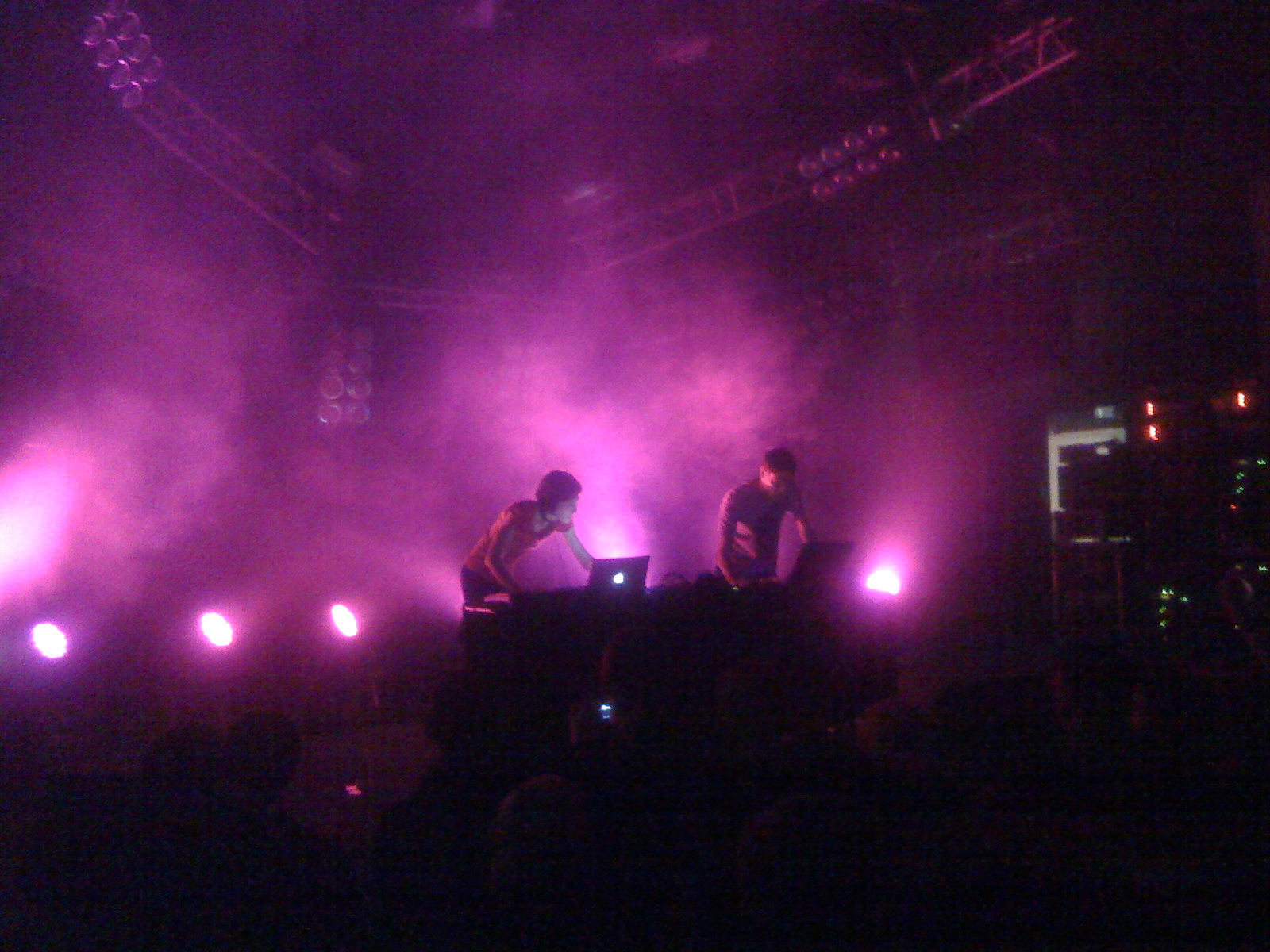 orphx auf dem Maschinenfest 2008